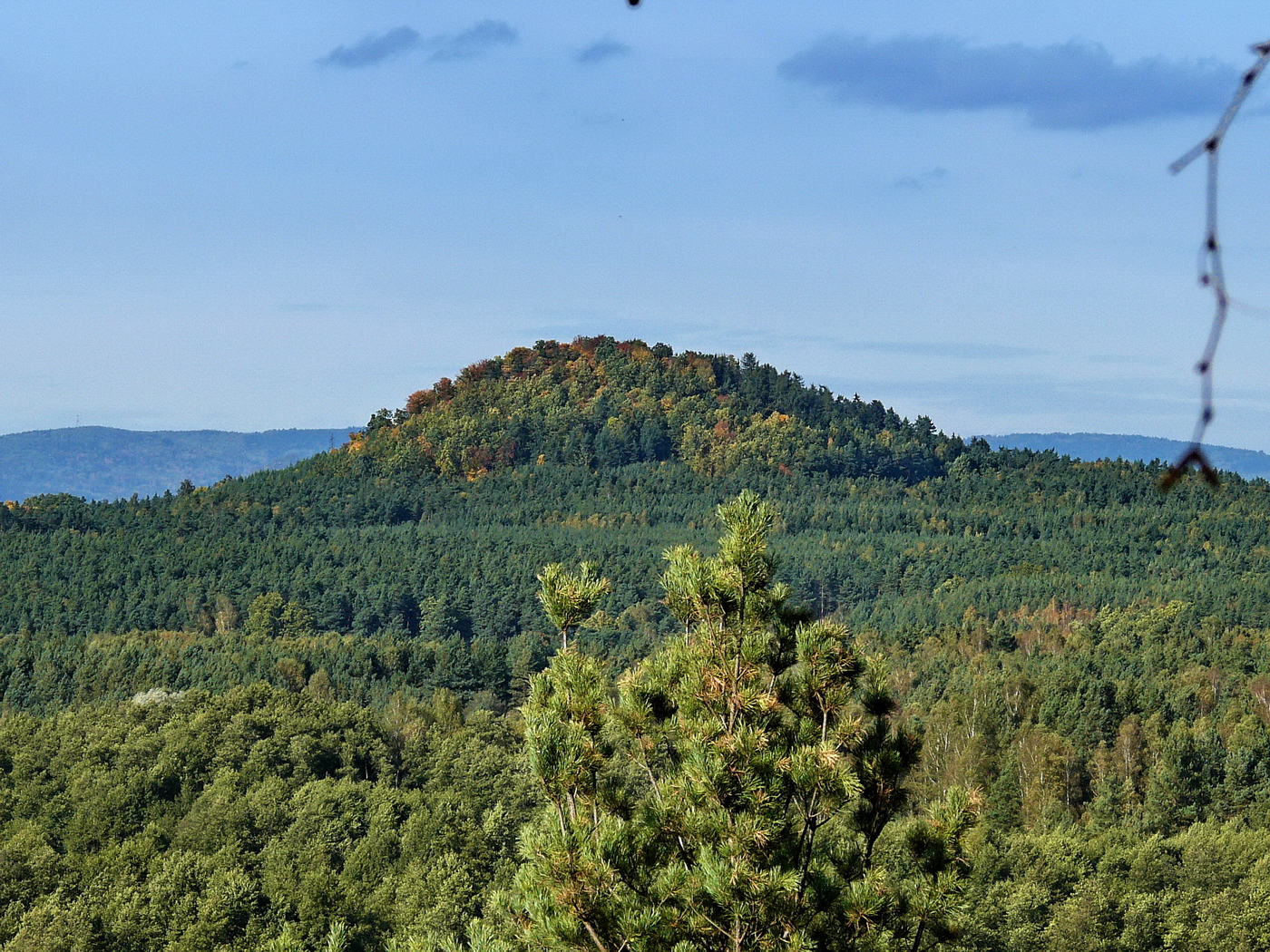 Kraví hora z hradu Jestřebí